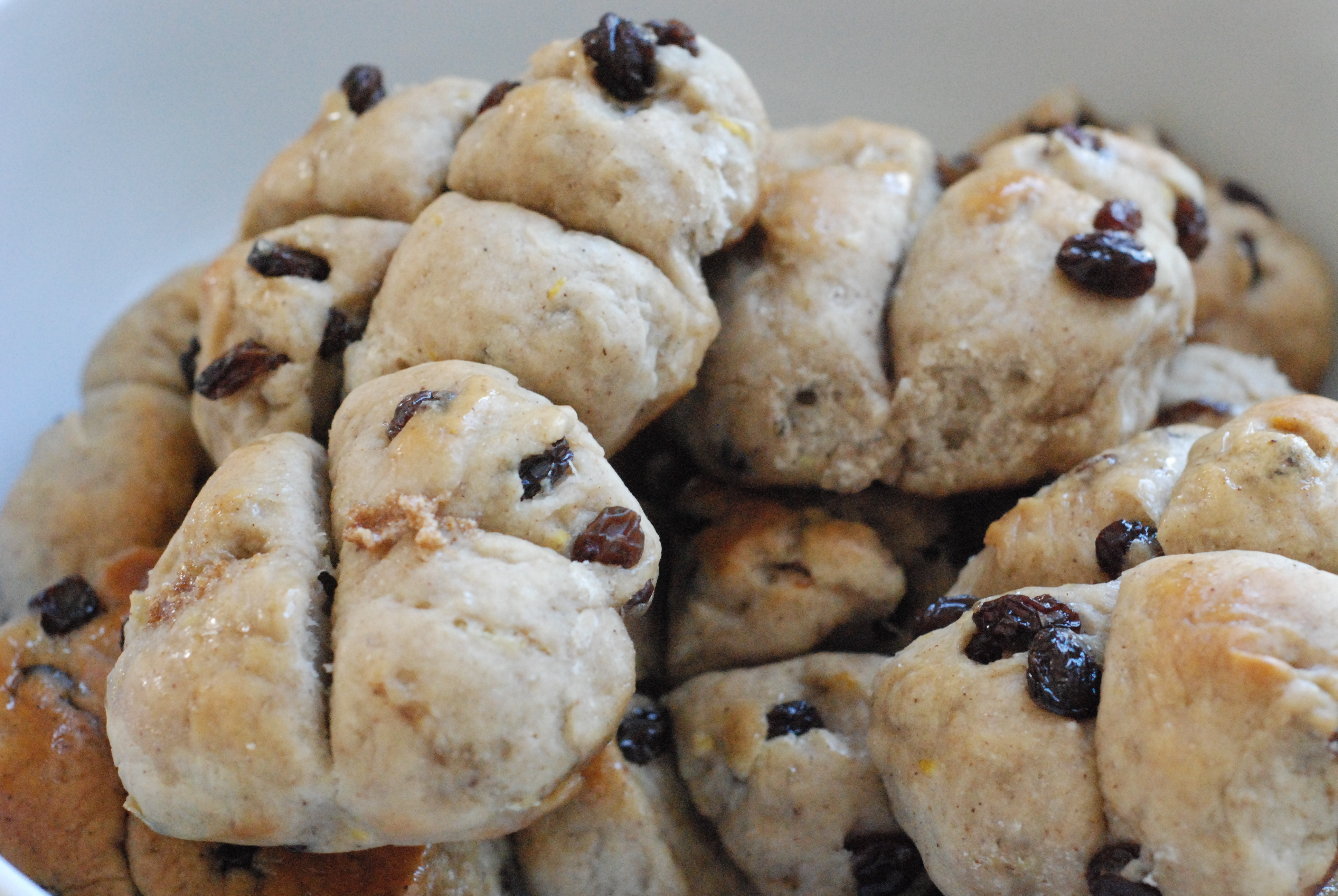 Hot Cross Buns detail